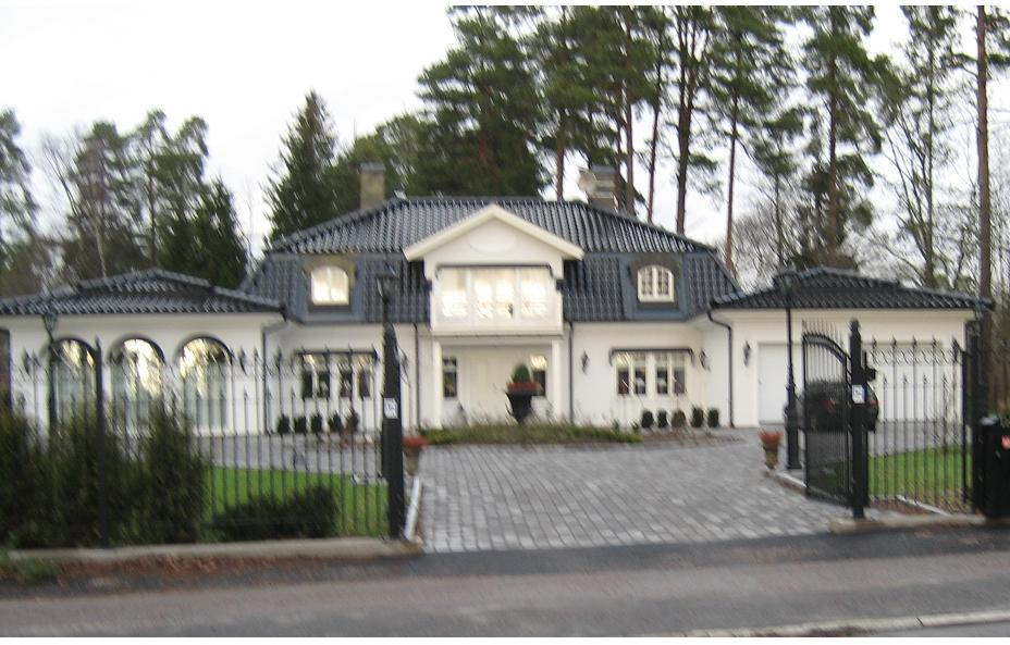 House in Adolfsberg, Sweden